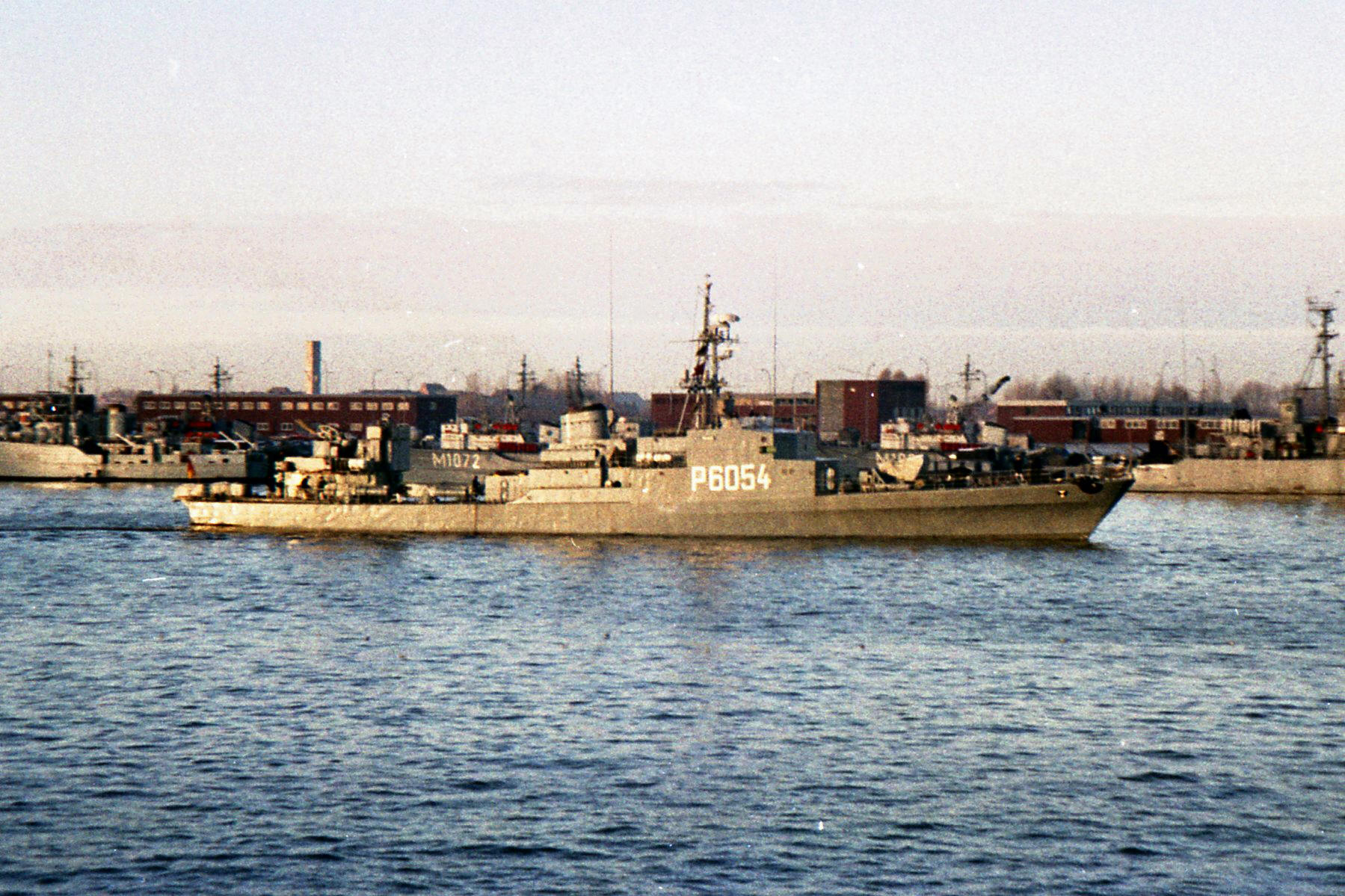 Najade (Thetis-Klasse) in der 4. Einfahrt (Wilhelmshaven)